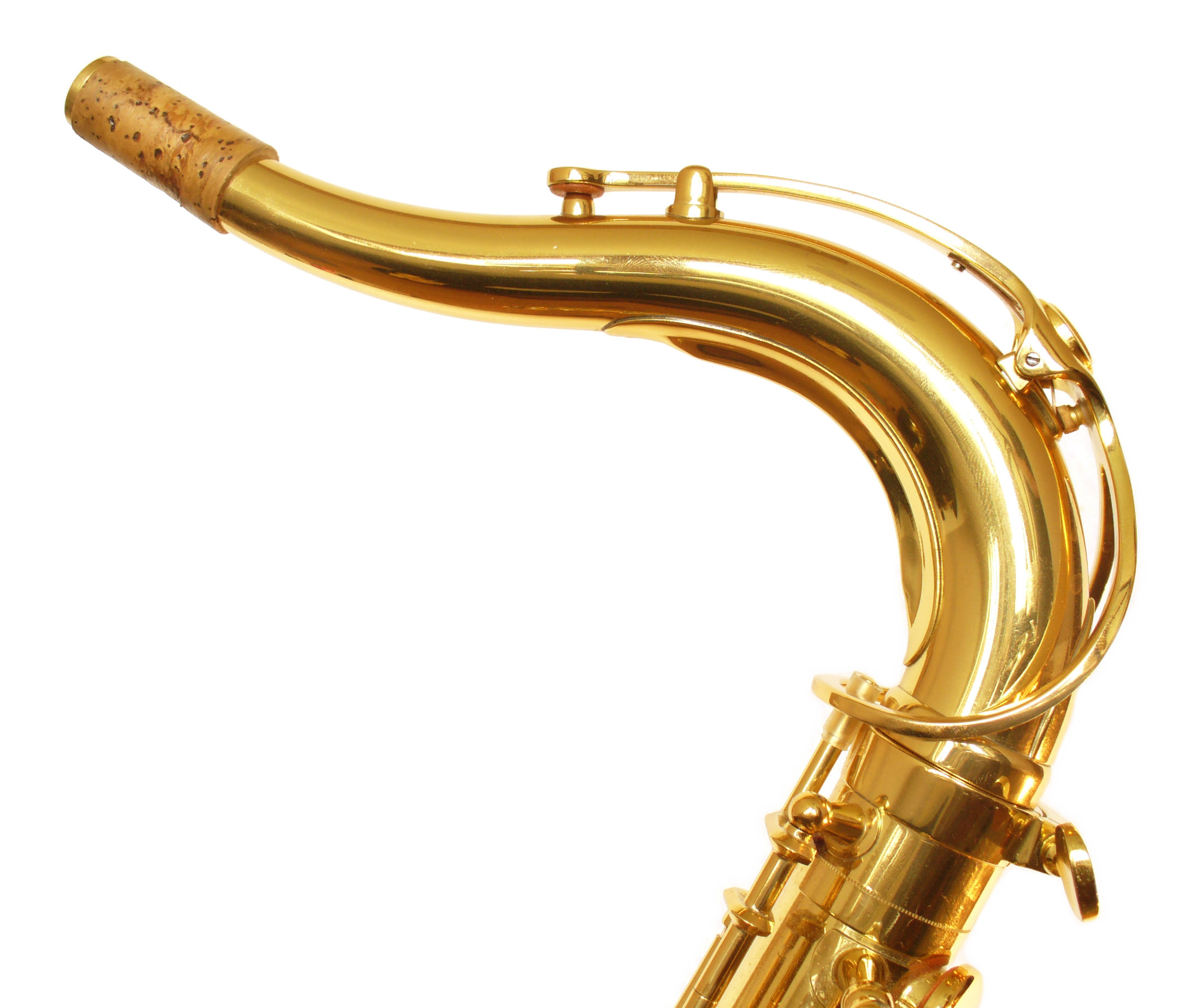 S-Bogen eines Tenorsaxophons (Yamaha YTS 62) mit Oktavklappe. This is a "G1" neck.